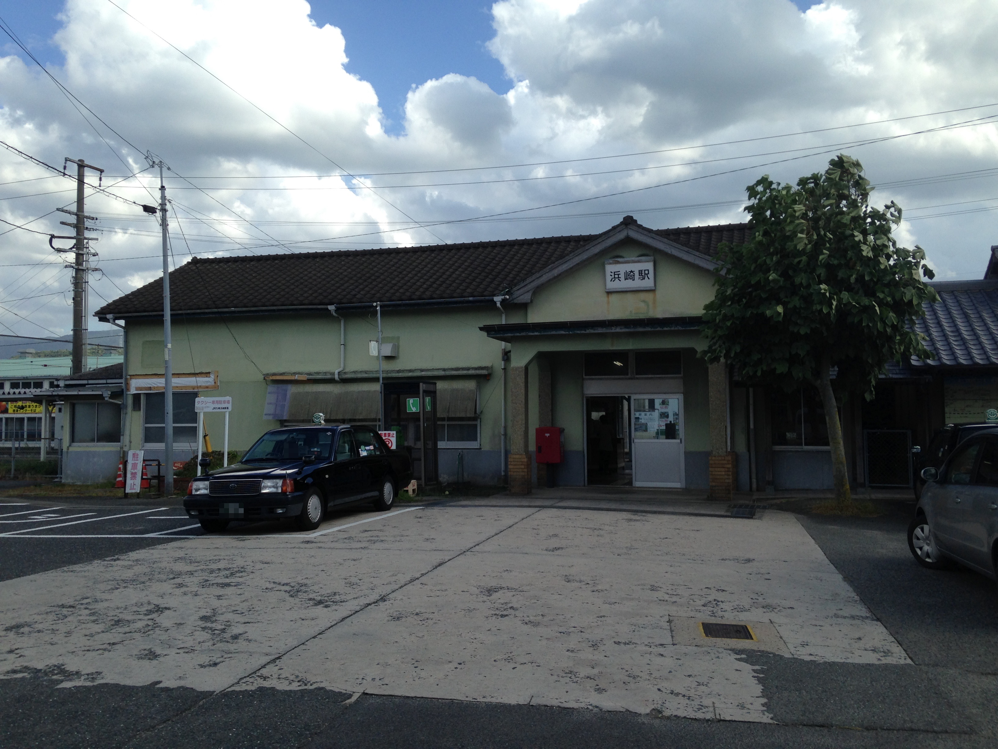 浜崎駅駅舎